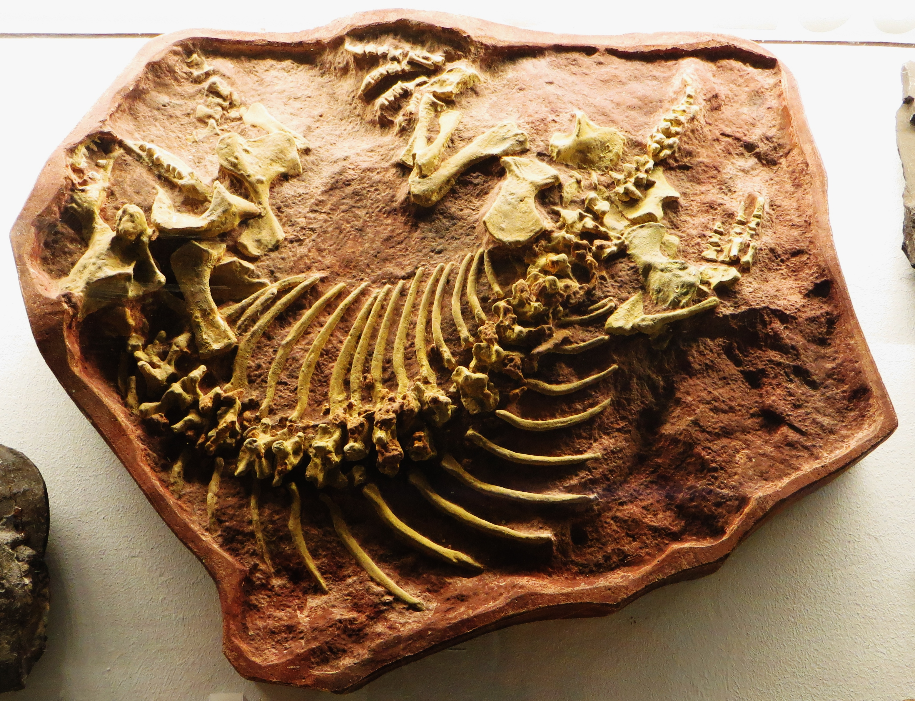 Fossil of Sclerosaurus, an extinct reptile- Took the picture at Museum of Paleontology, Tuebingen